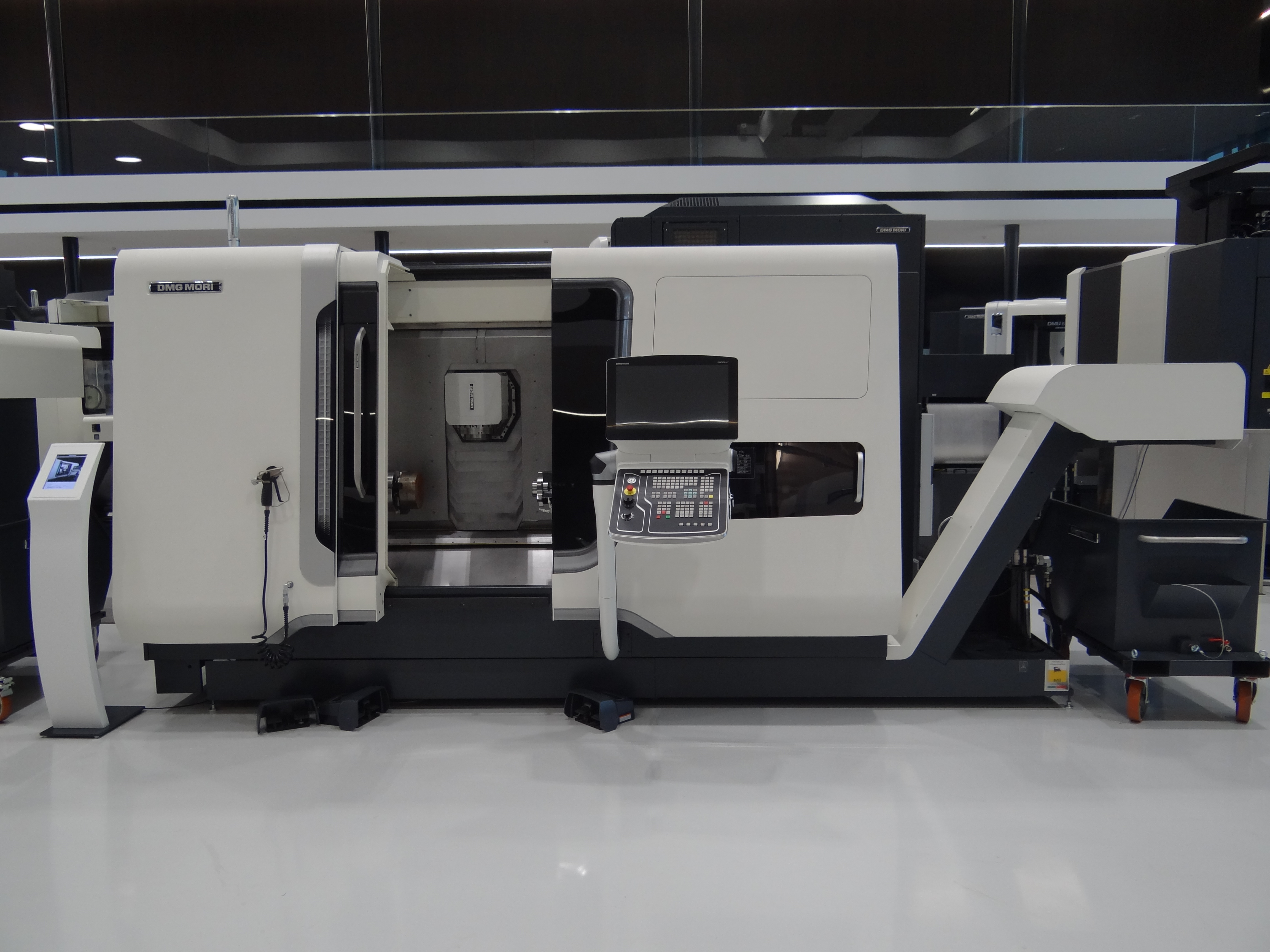 Werkzeugmaschine